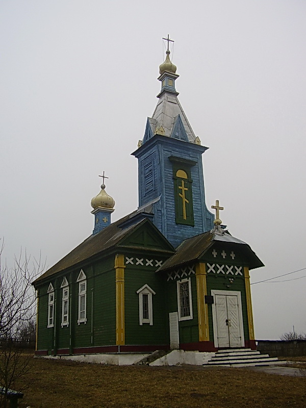 Малыя Жухавічы. Царква ў гонар Раства Іаана Прадцечы